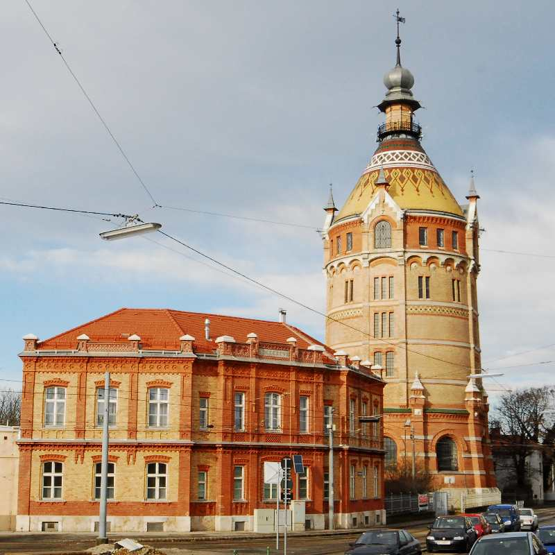 Wasserbehälter Wienerberg der I. Wiener Hochquellenwasserleitung, Bedienstetenwohnhaus des Hebewerks Wienerberg mit Favoritner Wasserturm